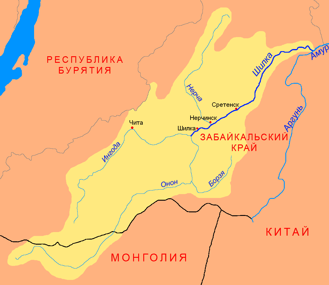 Схема бассейна реки Шилка